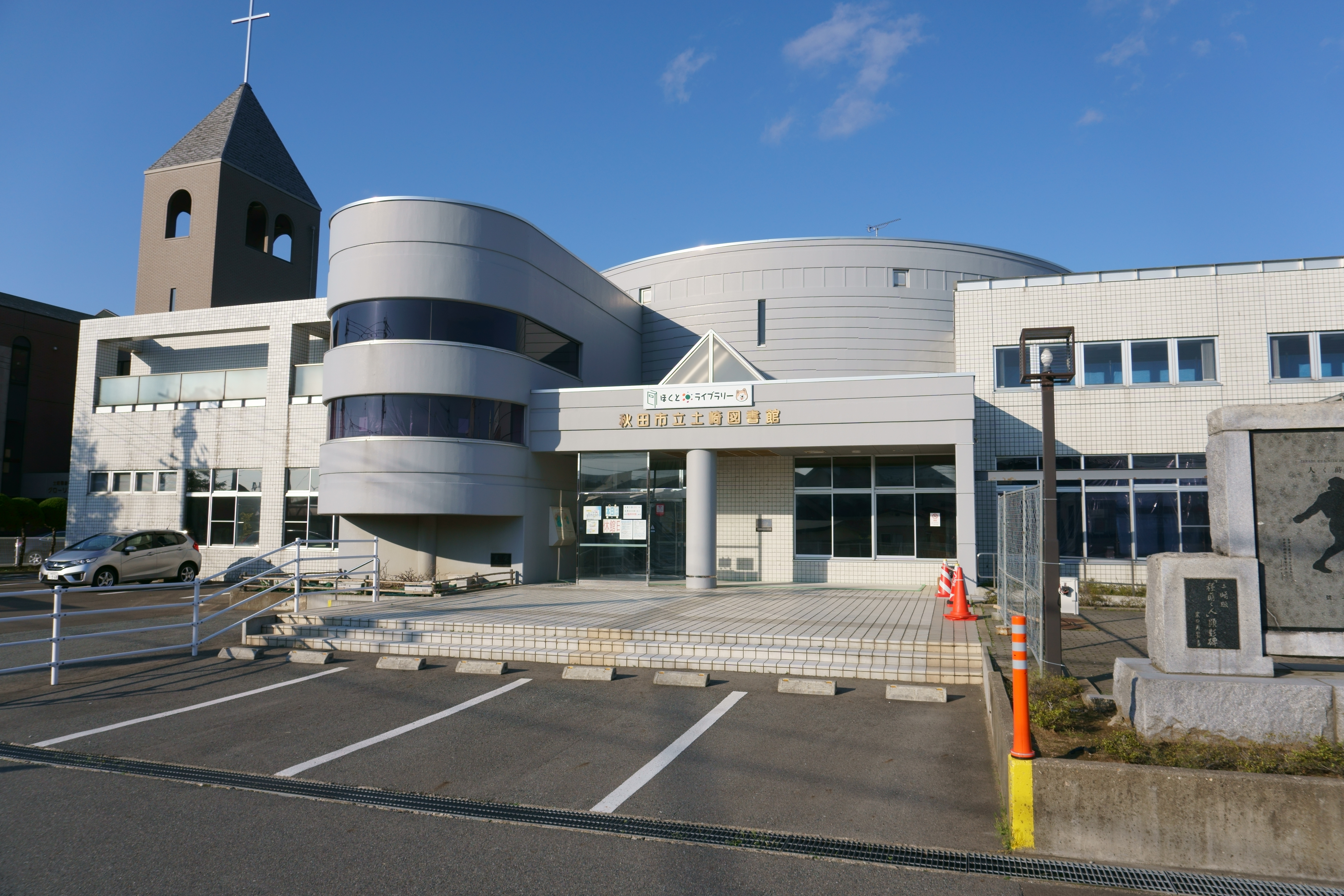 秋田市立土崎図書館（秋田市土崎港中央）